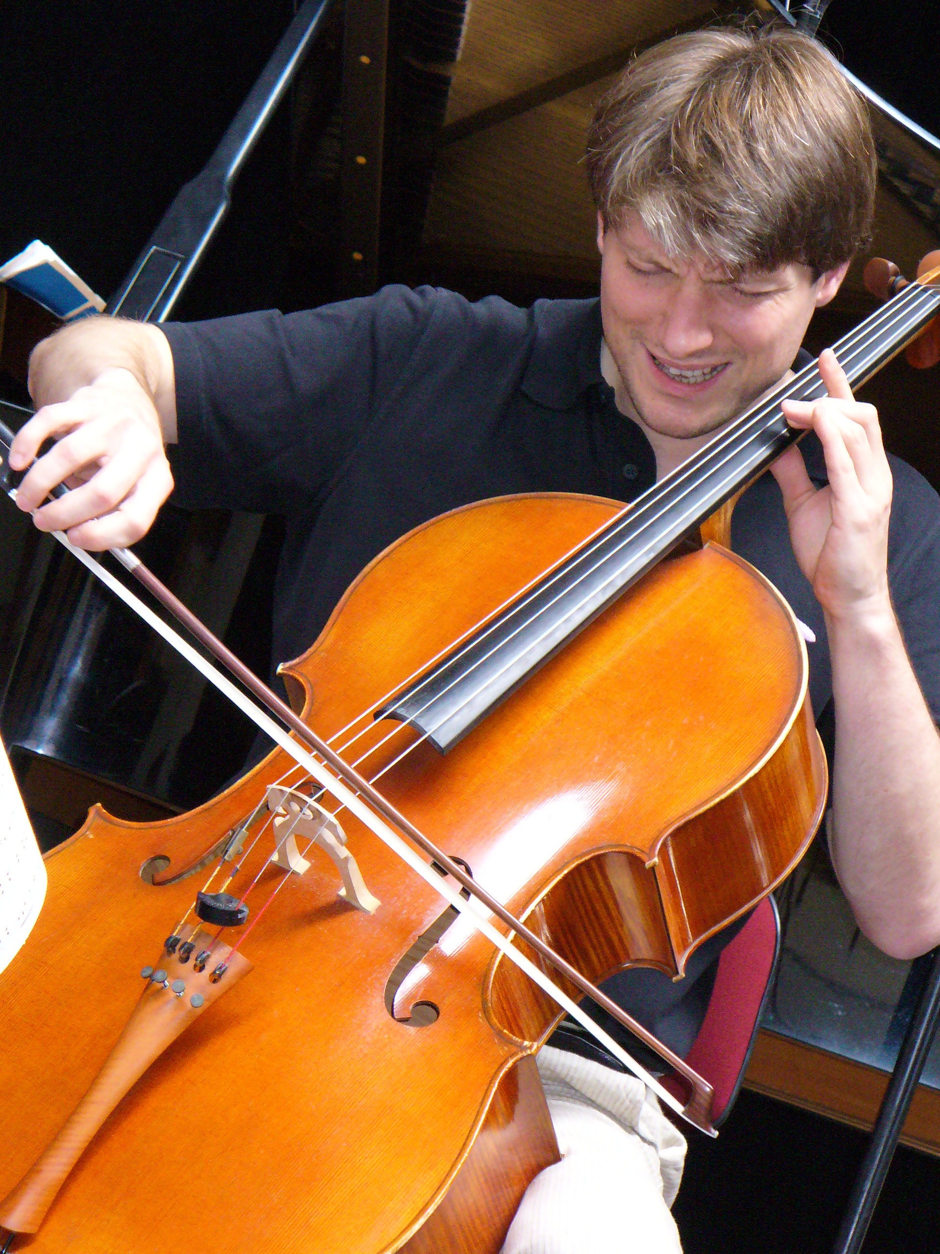 Jérôme Pernoo lors du festival "Les Vacances de Monsieur Haydn"